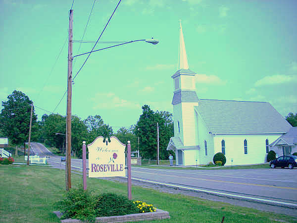 Roseville, Pennsylvania